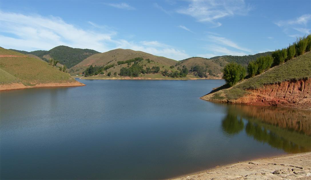 Prainha Natividade da Serra, São Paulo